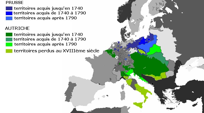 Carte des évolutions territoriales de l'Autriche et de la Prusse au XVIIIème siècle, avec légende.